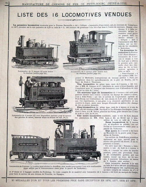 Decauville N°30 Février 1882, p. 64 Locomotive de 2,5 tonnes pur bruler le carbon. La ... locomotive du Porteur a ete Passe-Partout, locomotive de 2 tonnes et demie a voie de 0,50 qui a obtenu le premier prix (medallie d'or) de chemins de fer et locomotives agricoles a Lille en 1879. Locomotive de 3 tonnes pour bruler bois ou carbon. Un locomotive de nuveau type, mais de 3 tonnes, a ete vendue a MM. M. Gargam et Cie, fabricants de sucre a Saint-Quentin, qui l emploient pour le transport de betteraves avec 3 kilometres de voie de 0,50 en rails de 7 kilos. Locomotive de 2,5 tonnes avec disposition speciale pur le service des galeries de mines, hauteur totale aud dessus du rail, 1 m 75. Les ateliers de Petit-Bourg presedent egalement un type special pour le services des galeries des mines. Locomotive 2,5 tonnes a cabine pour abriter le chauffeur, avec tender peur porter l'eau et le combustible, type adopte par le Gouvernmen russe pour la guerre du Turkistan. Deux locomotives de 7,5 tonnes, se chauffeur au petrole, ent ece liveres auf Gouvernment russe pour la guerre du Turkestan. Un autre type est 'Panama'. locomotive a voie de 0,60 de 5 tonnes a vide, et 5 tonnnes en ordre de marche pouvant, grice aux provisions d'eau et de combustible portees par son tender, mener un train de 15 tonnnes a quarante kilometres en meins de 2 heures, sans arreter. Cette locomotive destinee a la voie en rails de 9,5 kilos sert accuellemen a Petit-Bourg des expericences avec un train complet de voitures de 1ere, 2e et 3e classe et a bagages (modele du Festinog). Un train complet de ce materiel avec locomotive de 4 tonnes a ete livre au marquis de Campo, pour le service de son chateau de Vinelas, en Espagne.